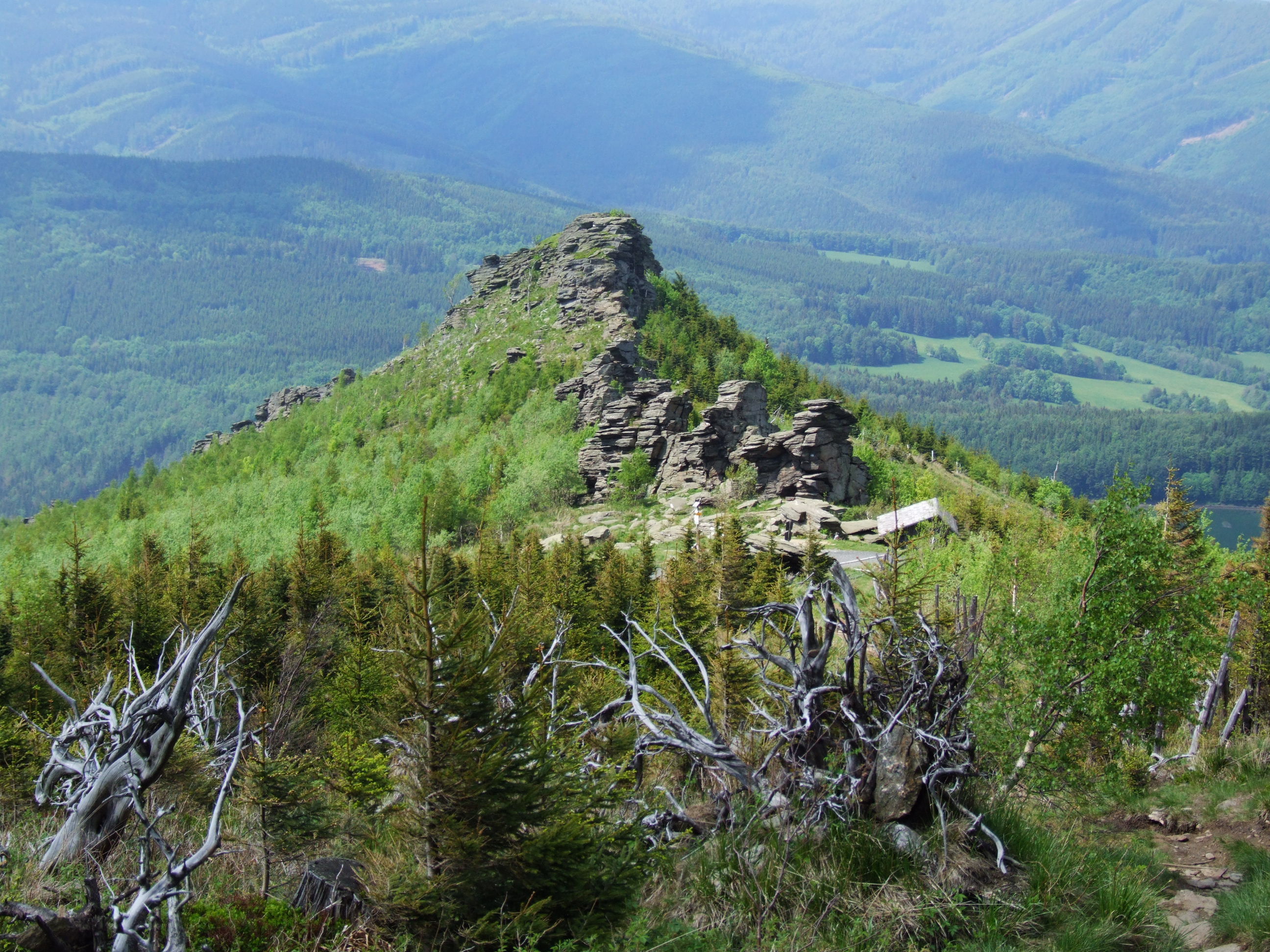 Obří skály ve květnu